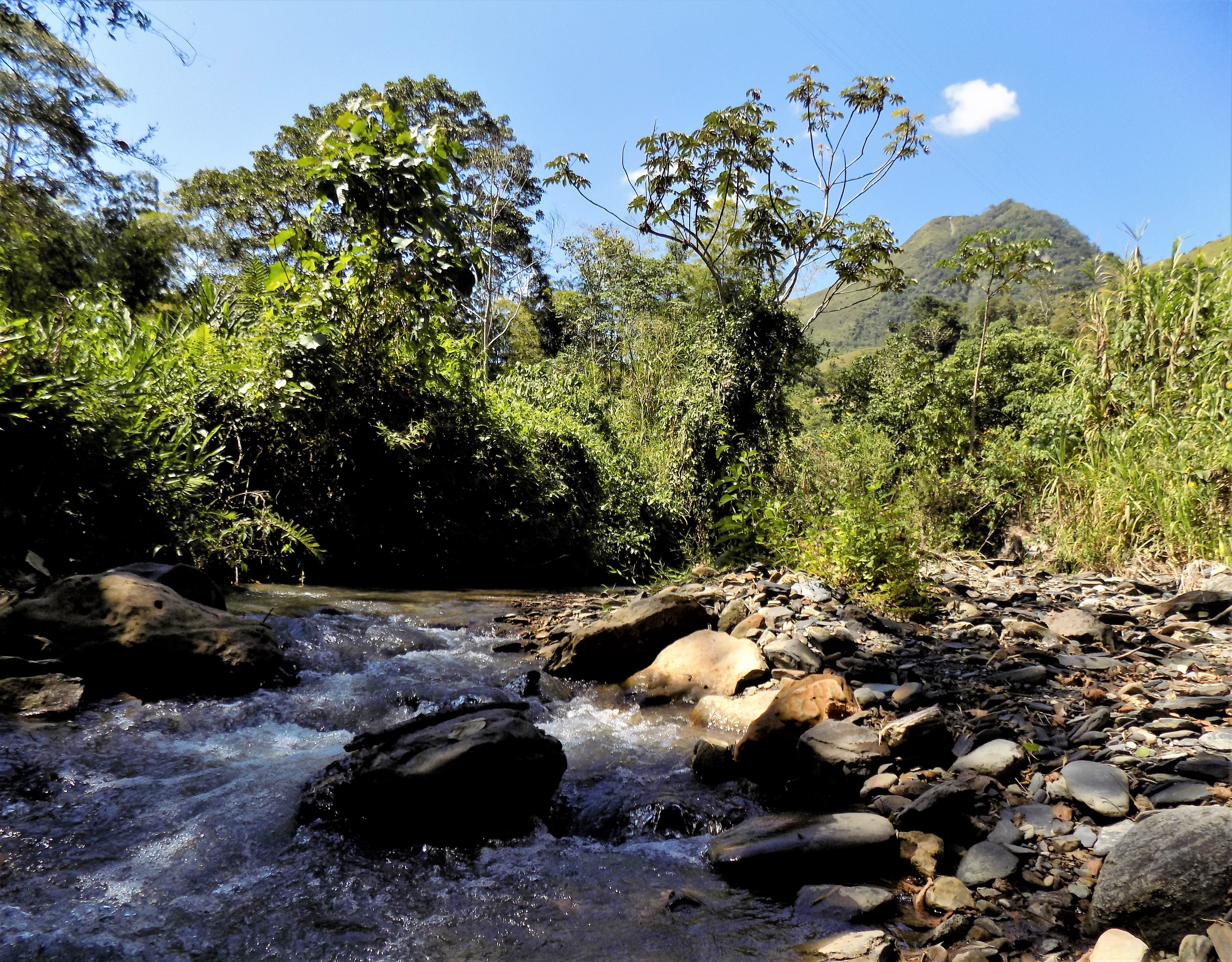 Quebrada poco profunda y de bajo caudal en tiempo seco donde se desarrollan caminatas ecológicas donde se puede disfrutar de hermosos paisajes y el avistamiento de fauna propia de la región.